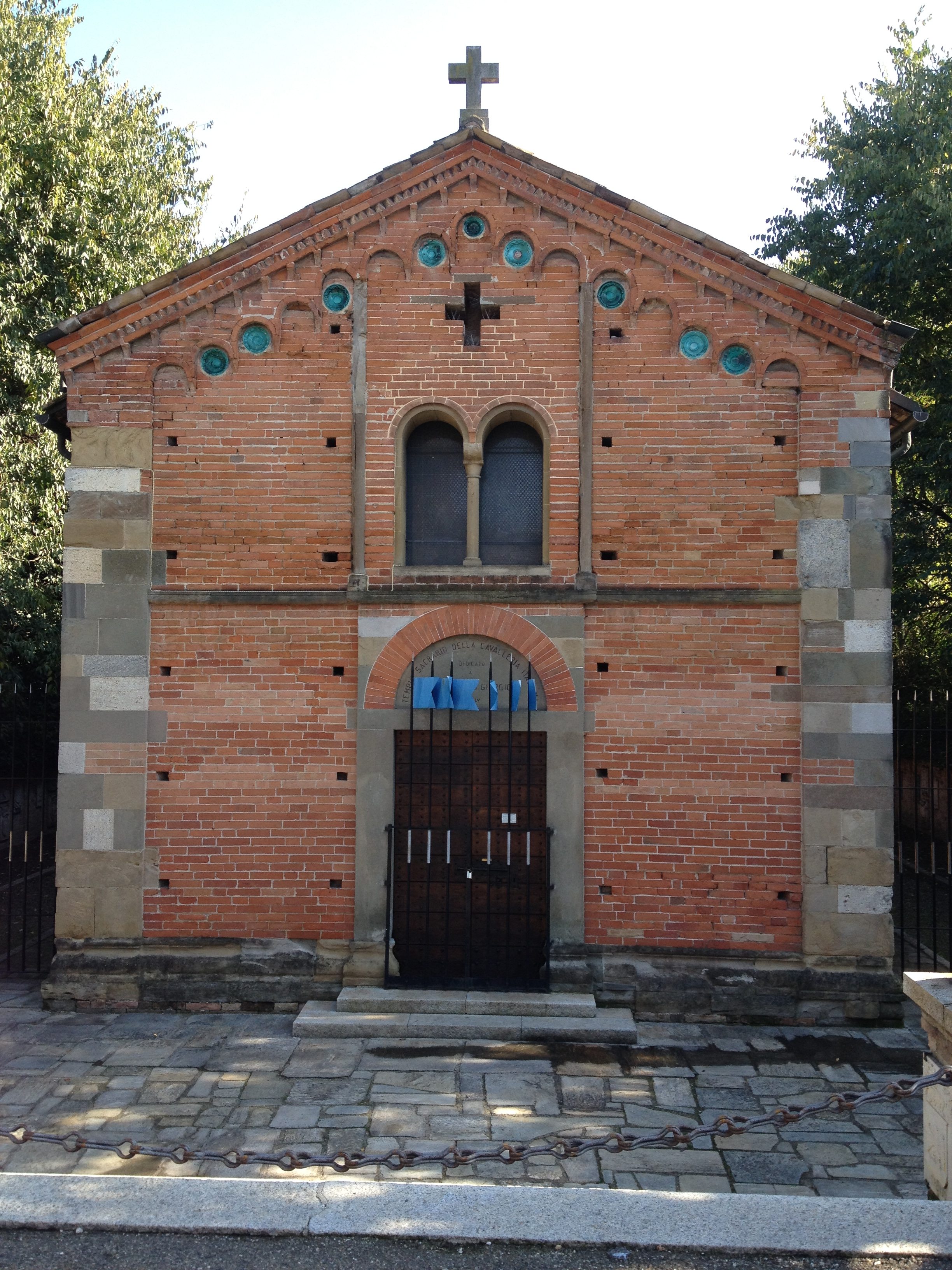 Veduta del Tempio Sacrario della Cavalleria Italiana di Voghera (PV)